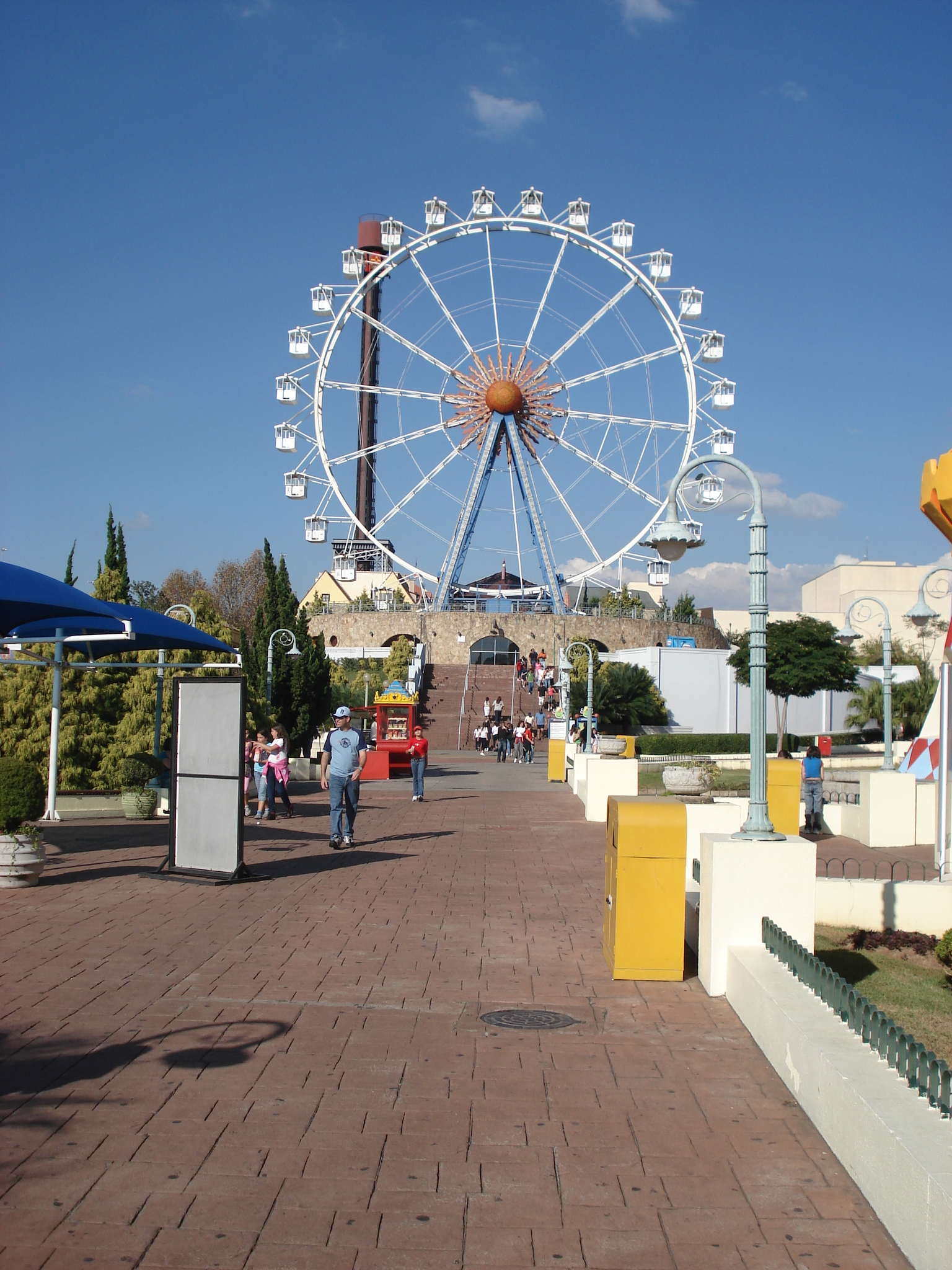 Roda-gigante giranda Mundi do parque de diversões Hopi Hari, em Vinhedo, Brasil.